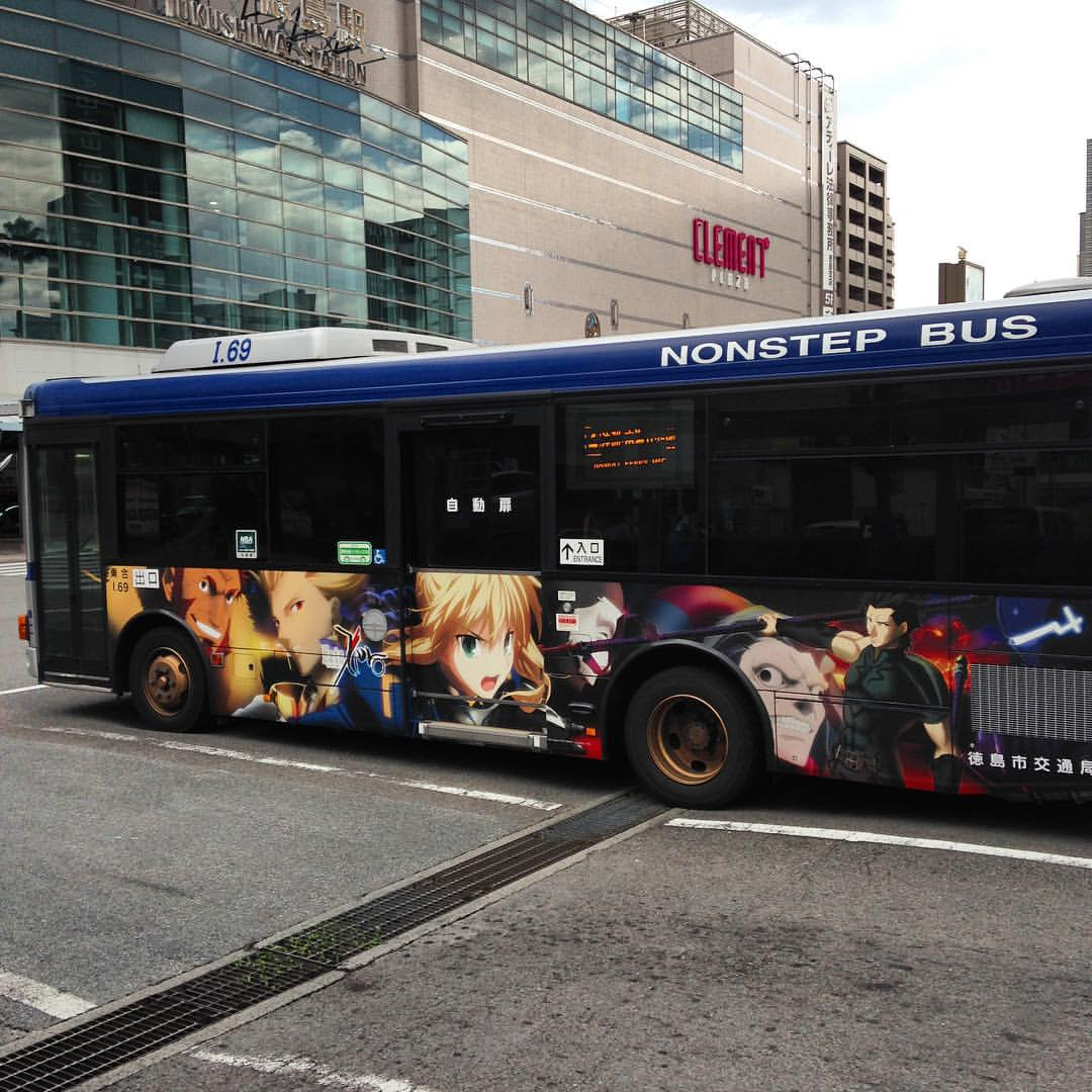 徳島駅入り口付近 徳島市交通局『Fate/Zero』のラッピングバス